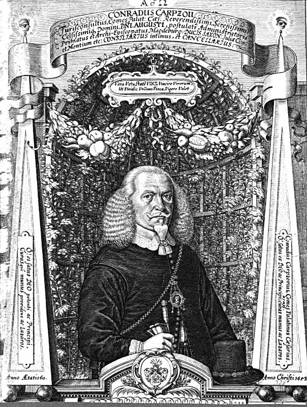 Kupferstich Konrad Carpzov (1593-1658) Jurist und Staatsmann